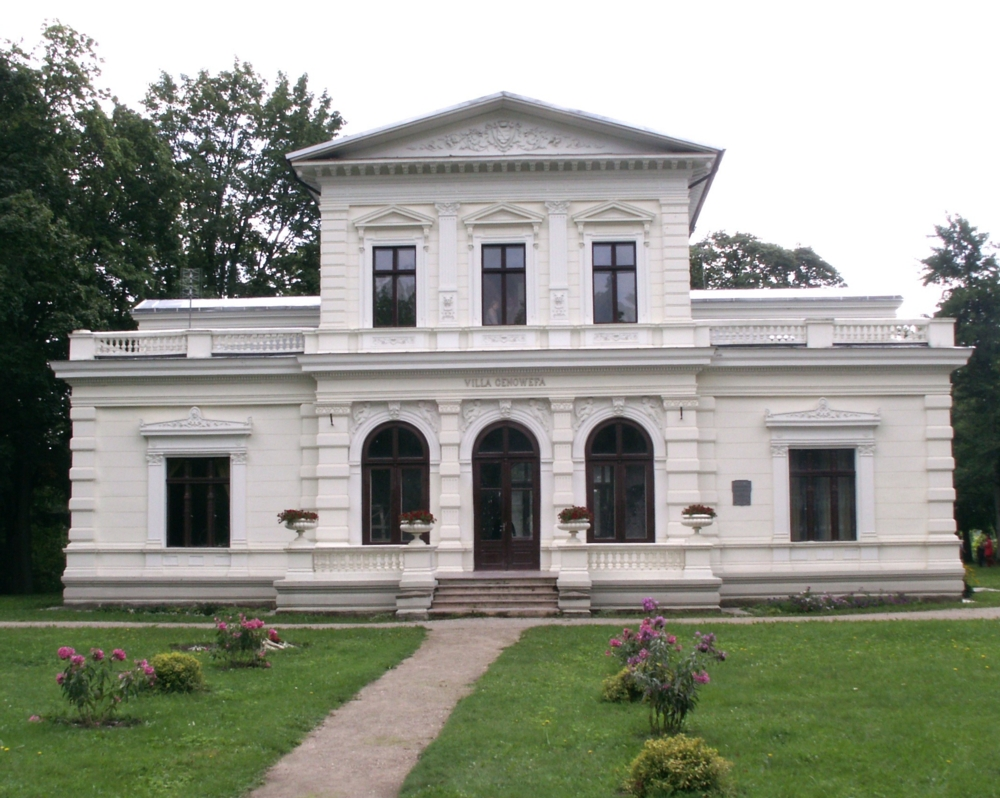 Švėkšnos dvaras, Švėkšnoje. Grafų Platerių Genovaitės vila